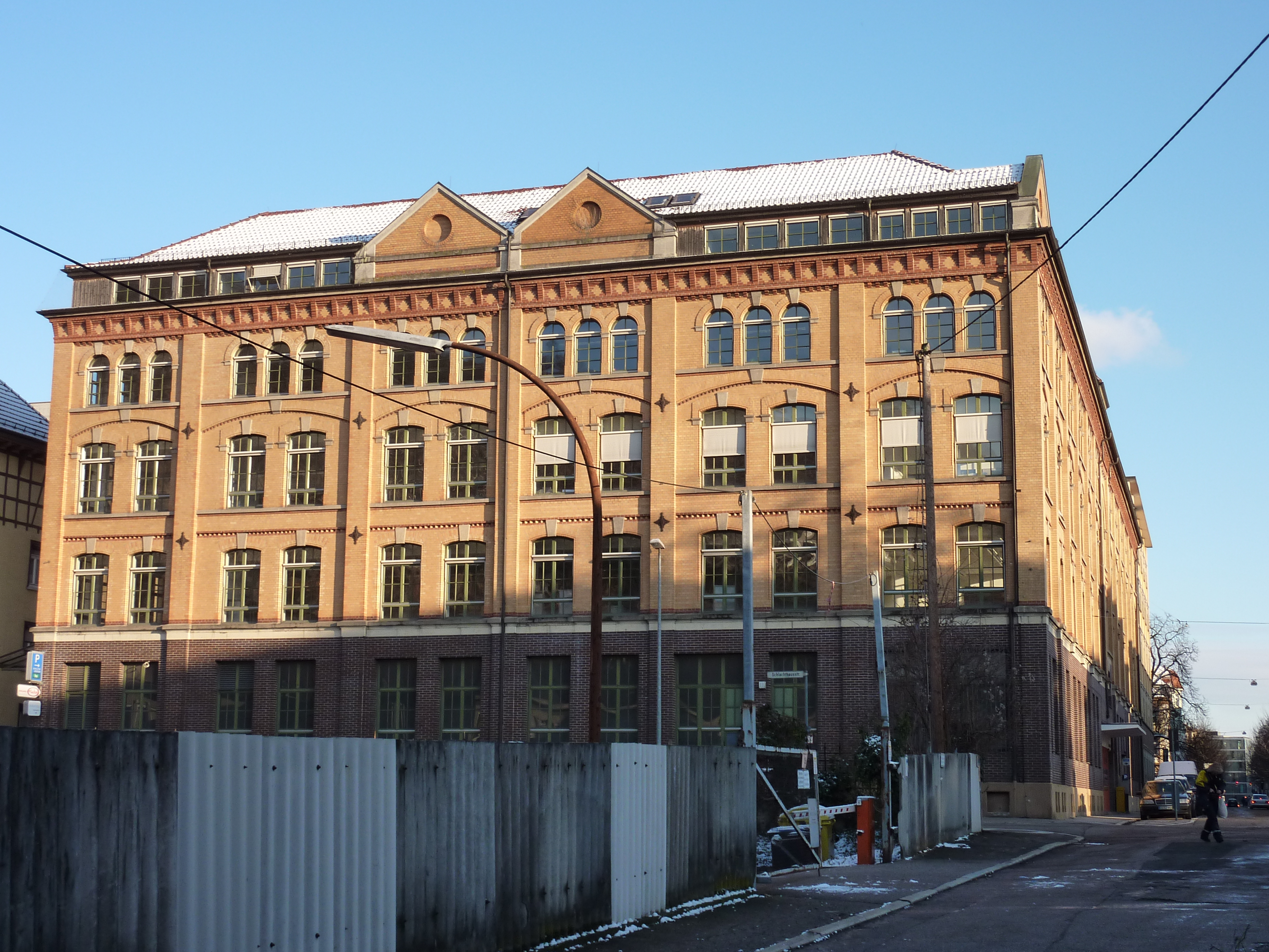 Schlachthausstraße - Gebäudefront in Esslingen am Neckar